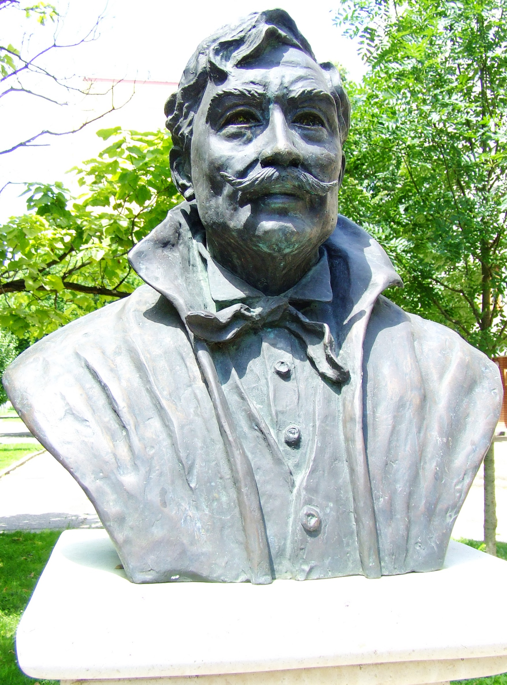 Thorma János festőművész mellszobra Kiskunhalason. Barth Ilona szobrászművész alkotása